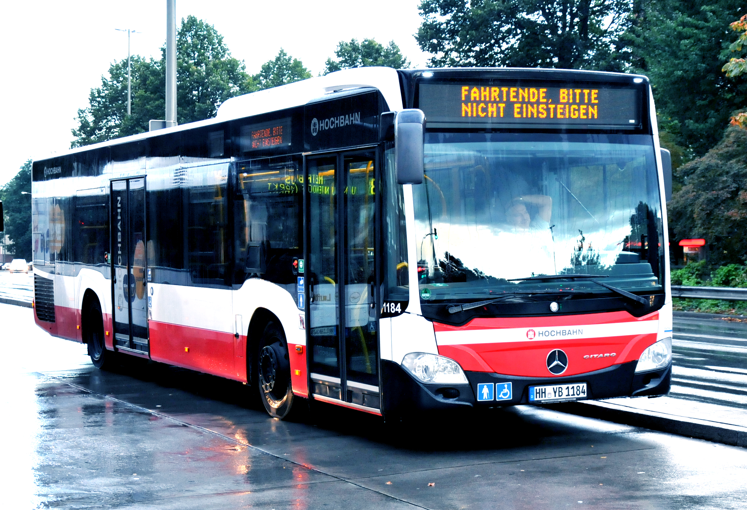 Hamburger Hochbahn bus 1184 van het type Mercedes-Benz Citaro II te Rennbahnstraße.